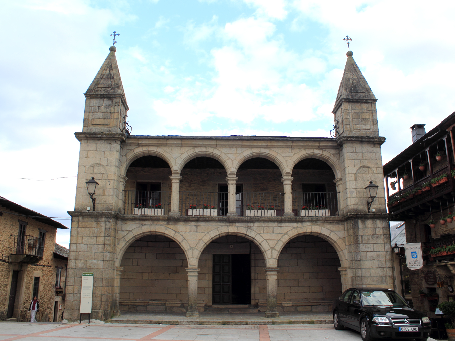 Ayuntamiento de Puebla de Sanabria (Provincia de Zamora, Castilla y León, España).